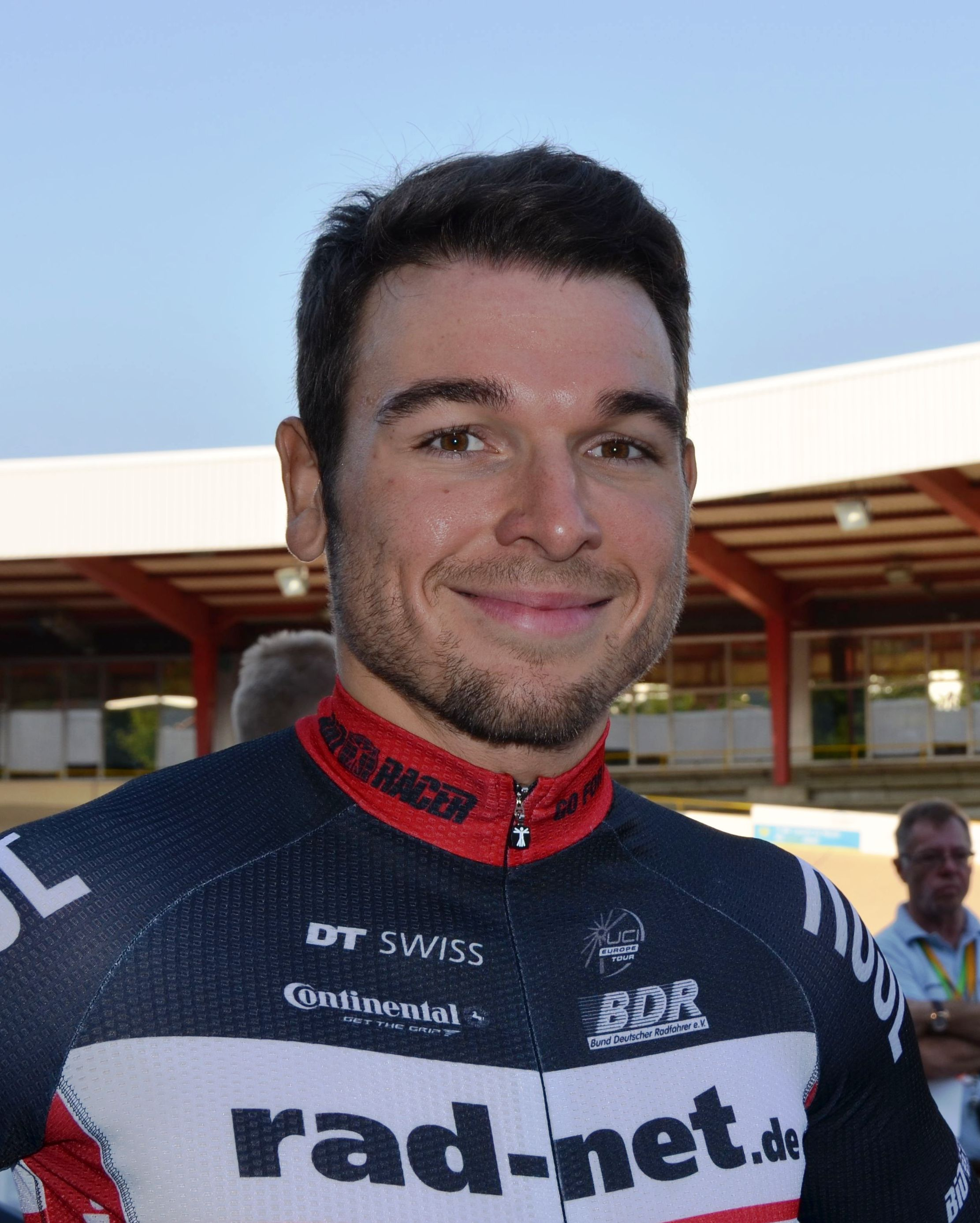 Kersten Thiele, deutscher Radsportler